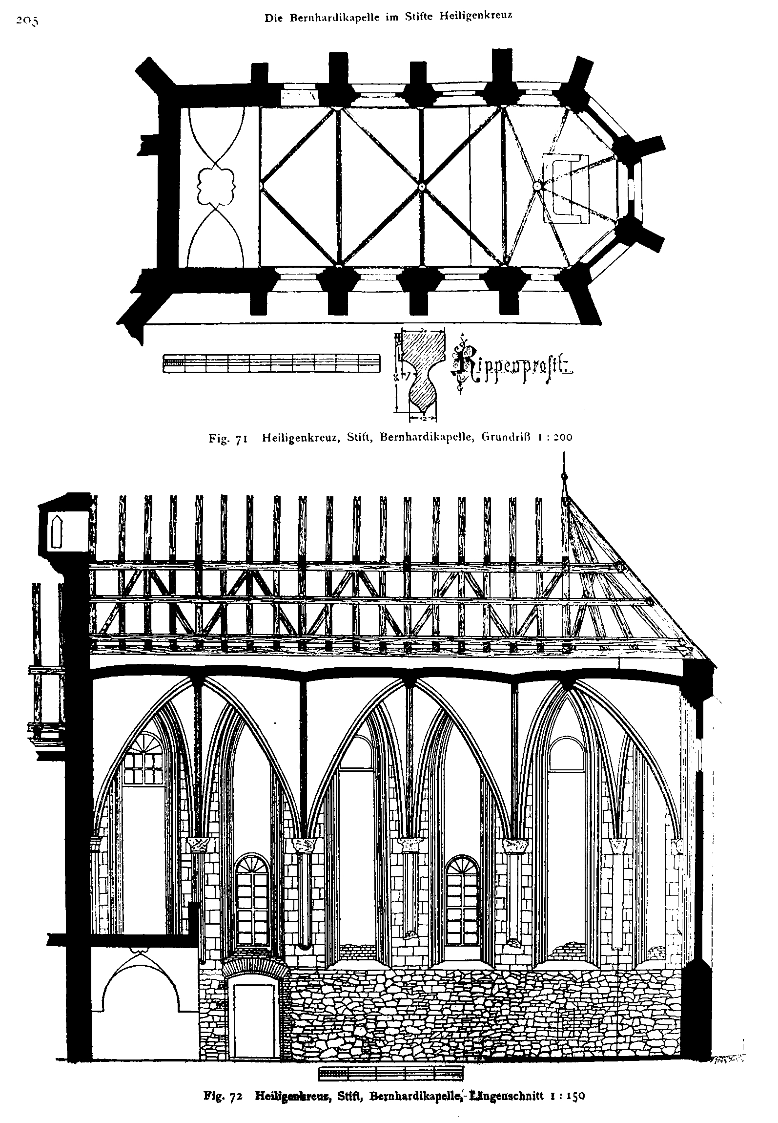 BDA-Archiv Artikel und Zeichnungen Bernhardikapelle Stift Heiligenkreuz Wien 1911 Mittheilungen der Zentralkommission für Denkmalpflege